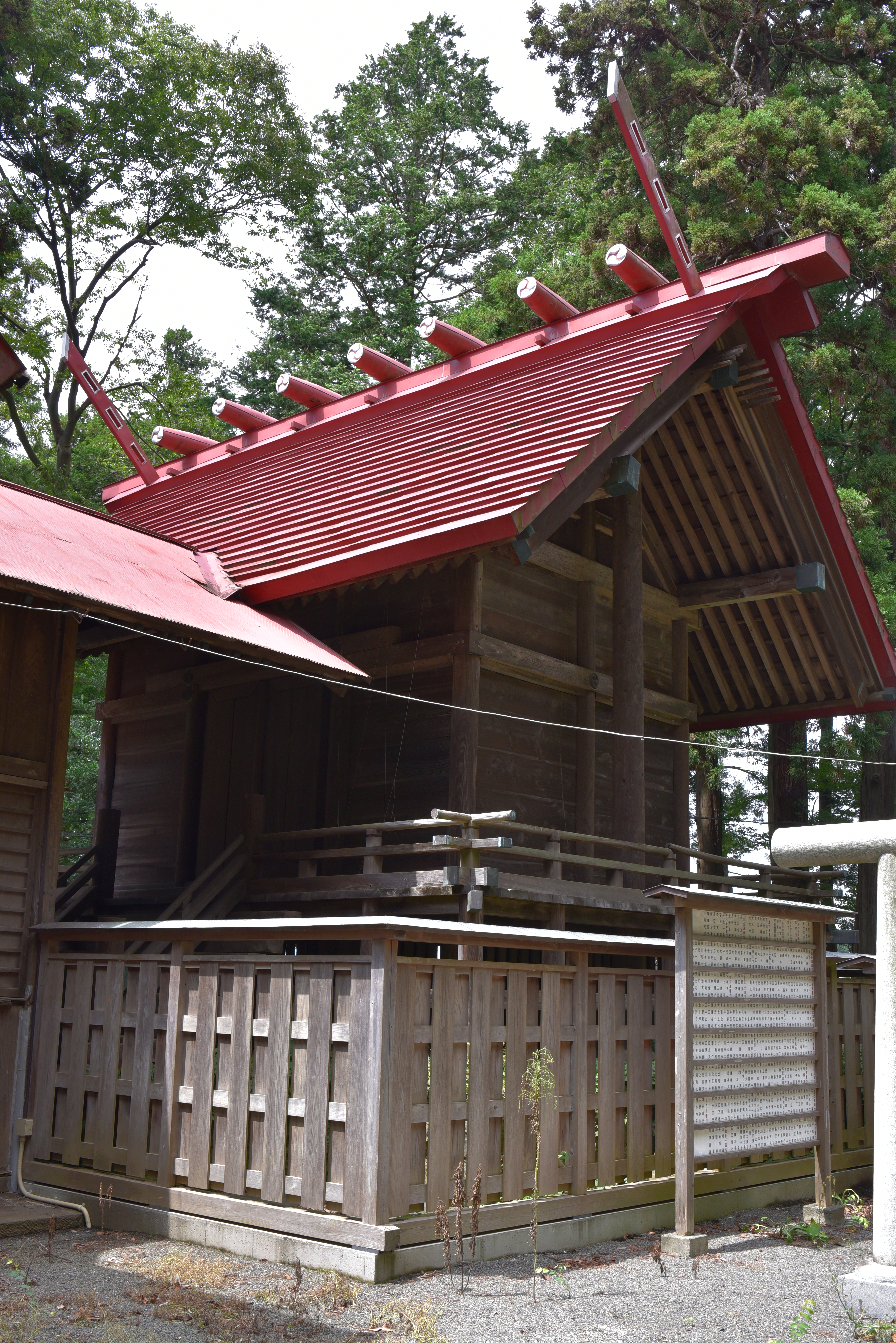 宇都母知神社の本殿（神奈川県藤沢市）